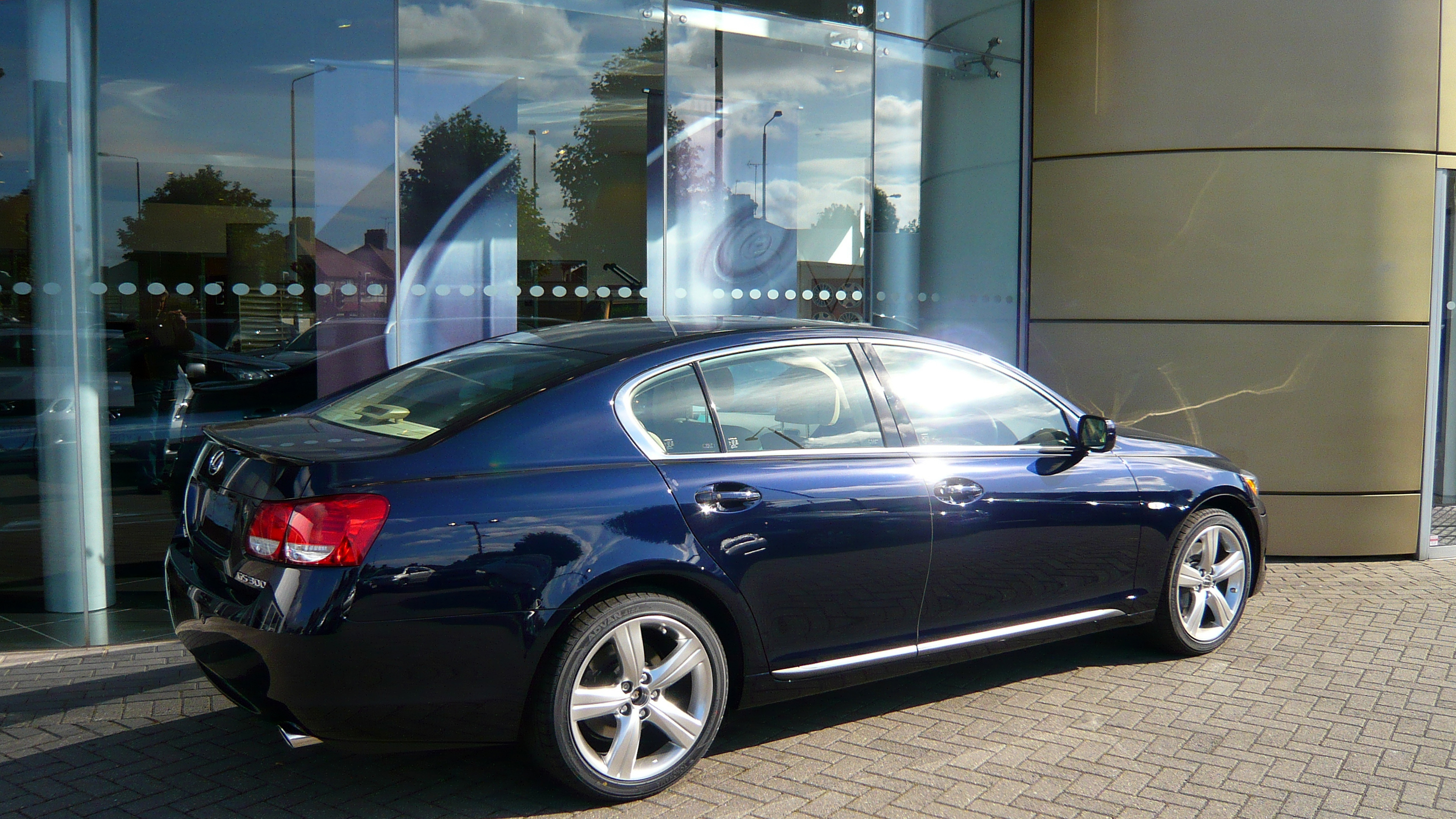 Lexus GS 300 at Lexus Twickenham in Middlesex